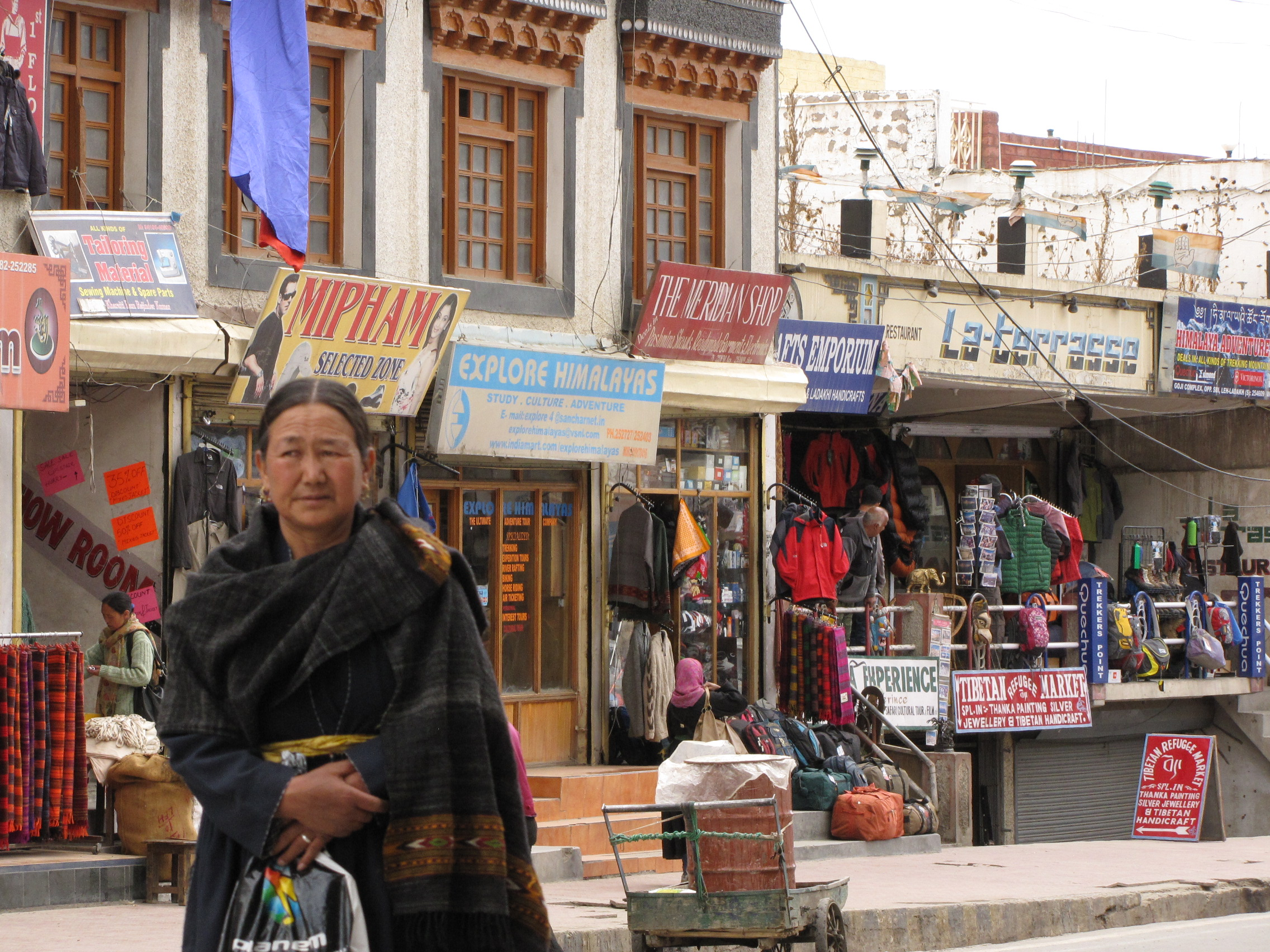 Leh